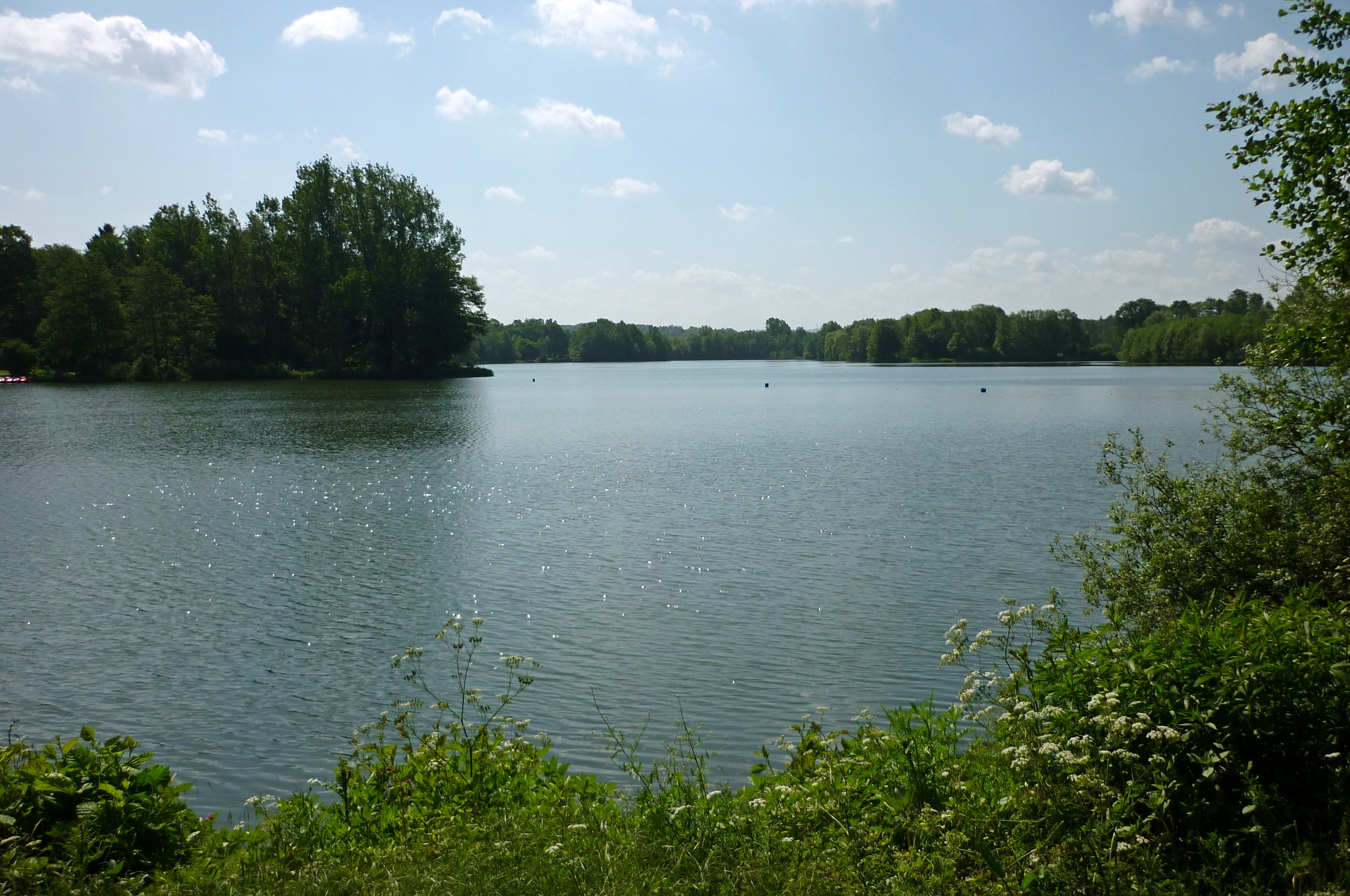 Osnabrück, Naherholungsgebiet Rubbenbruchsee